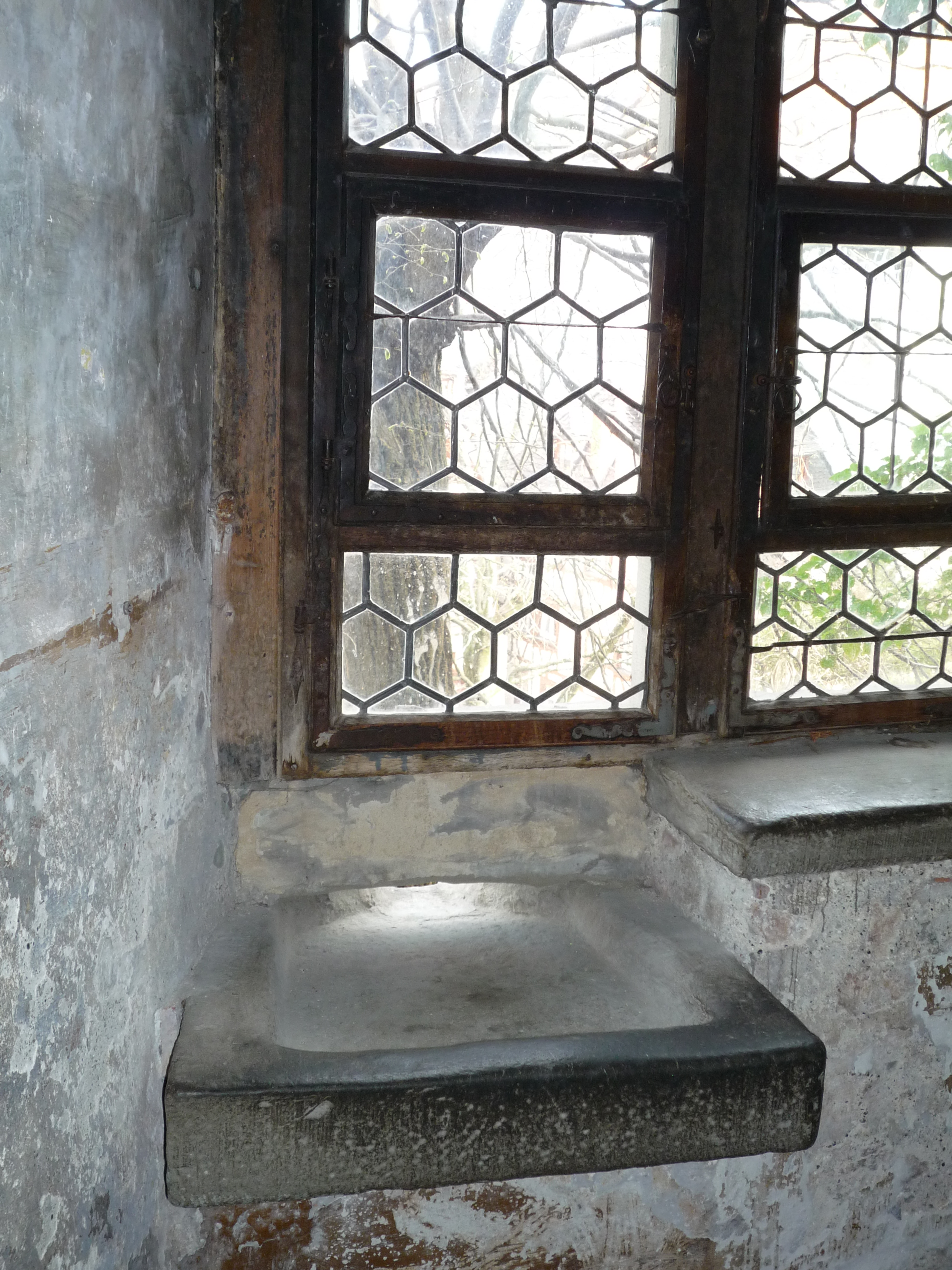 Burgküche der Burg Meersburg mit massiv gemauertem Herd und Ausgussstein unter der Fensterbank